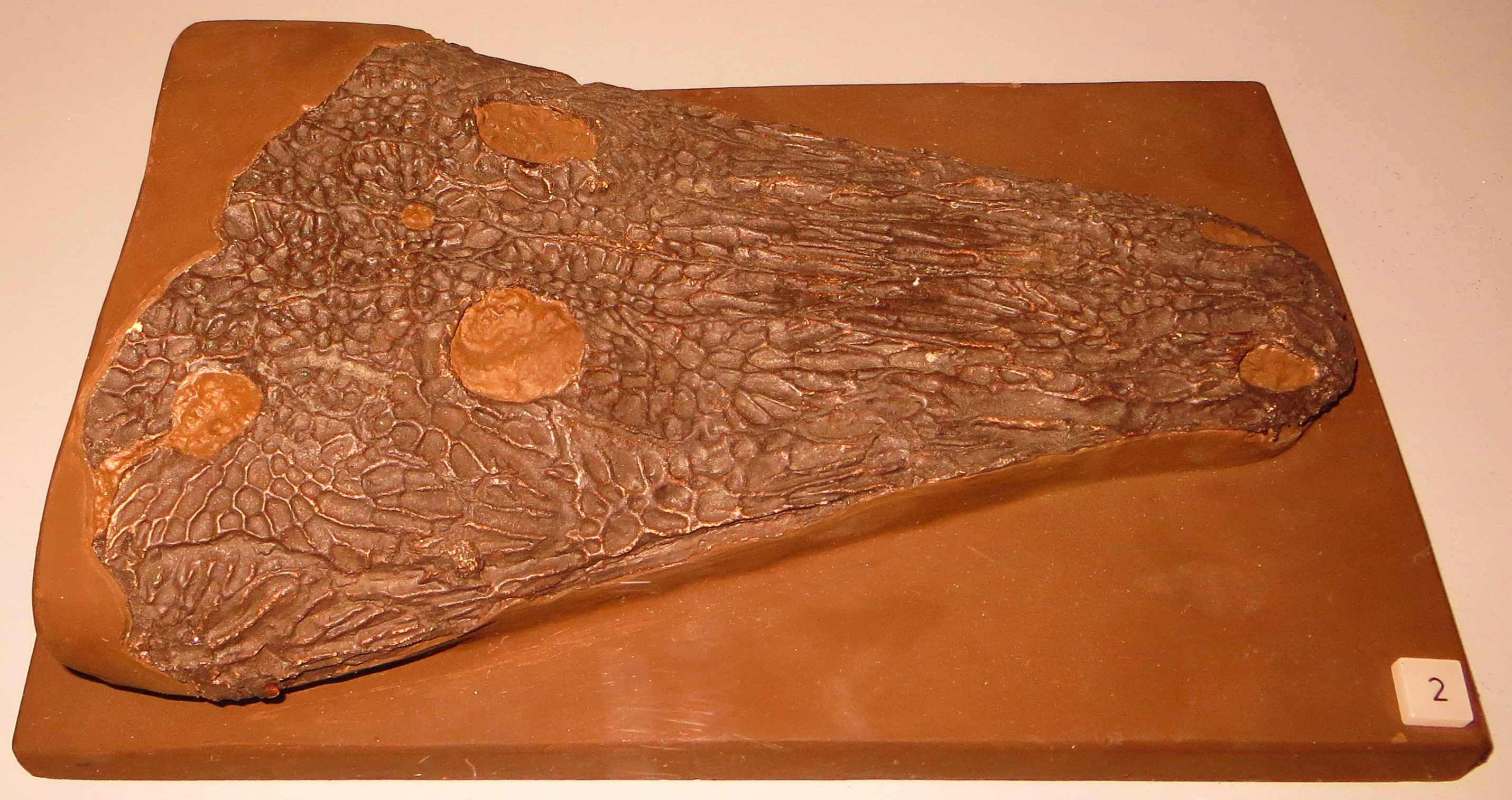 Fossil of Capitosaurus, an extinct amphibian- Took the picture at Museum of Paleontology, Tuebingen